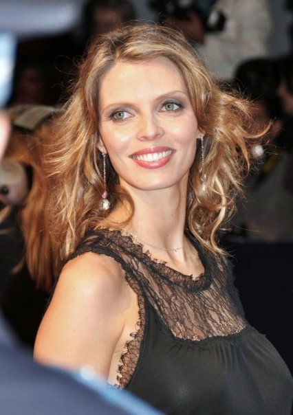 Sylvie Tellier au festival de Deauville 2009